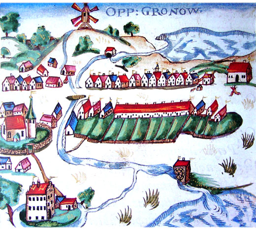 Groß Grönau um 1590. Oben die Windmühle des der Familie Rantzau gehörenden Gutes Tüschenbek, rechts darunter die Papiermühle am Ausfluss des Blankensees der mit 6 m Gefälle zur Wakenitz entwässert und unten rechts die Grönauer Mühle kurz vor der Einmündung der Grönau in die Wakenitz.